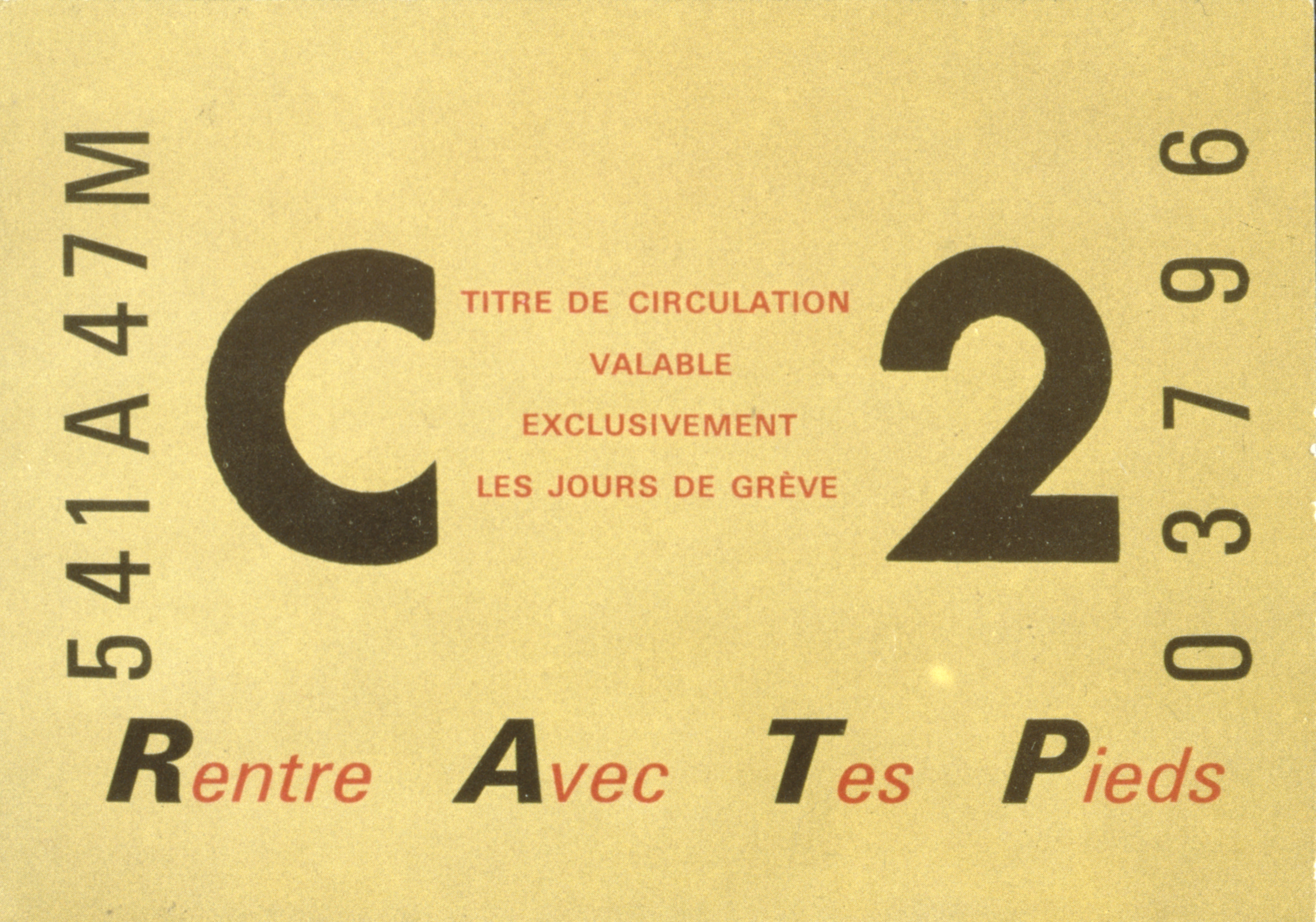 Faux ticket de métro Titre de circulation valable exclusivement les jours de grèveRentre Avec Tes Pieds